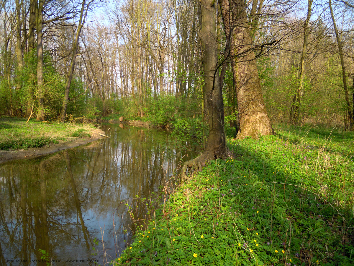 Lužní les - Tok Malé Bečvy v Chrbovském lese - duben 2014